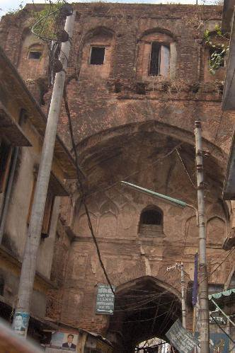 Bara Katra shamsina zaman sarah